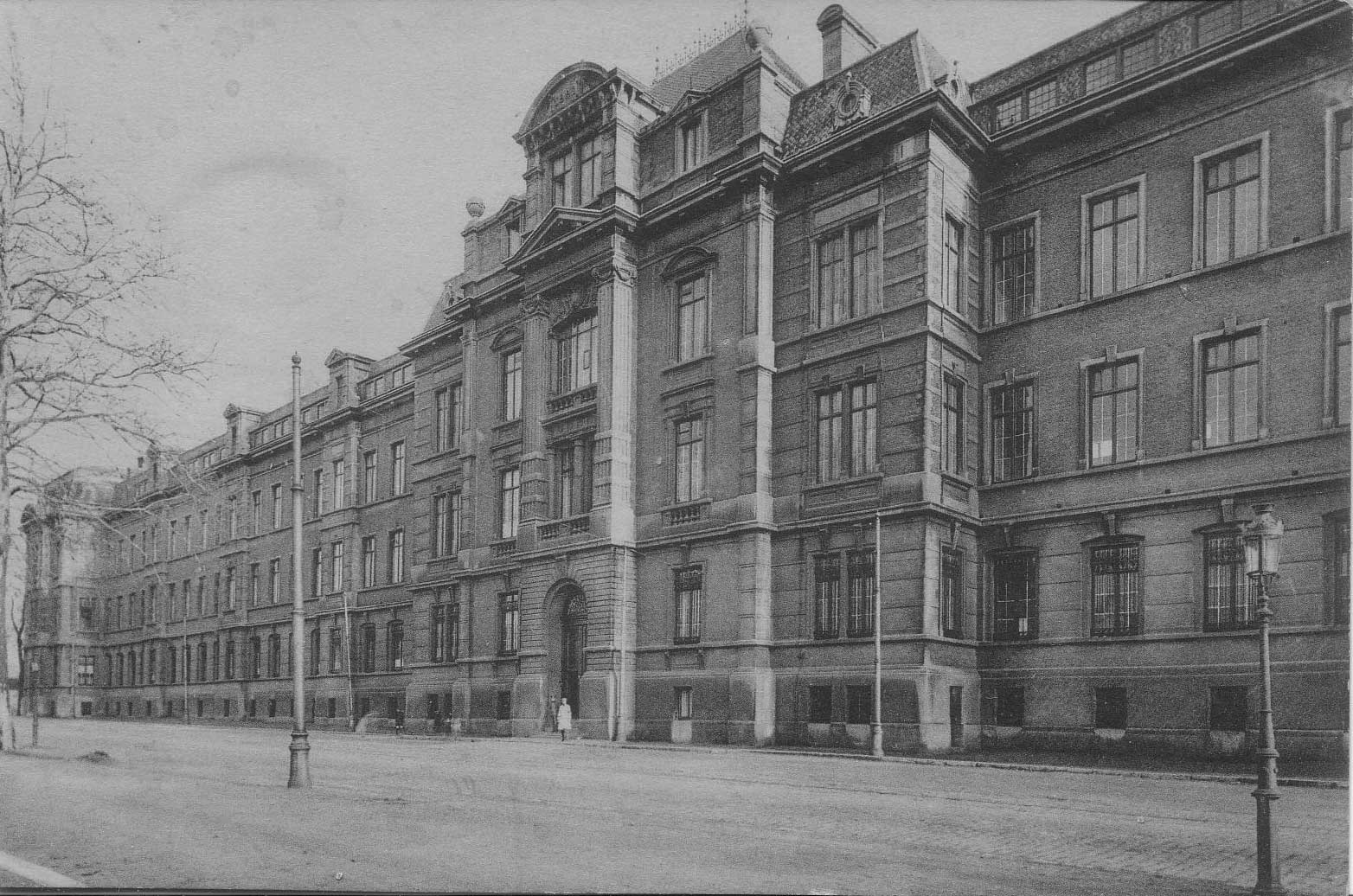 Monumentale gevel